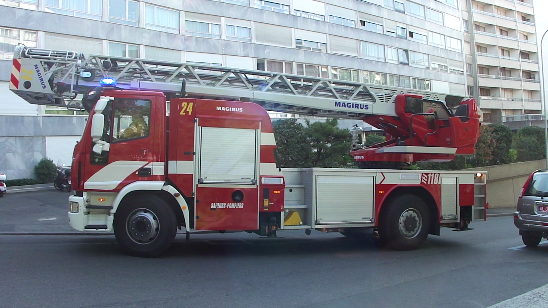 Auto-échelle César 24 du Service d'incendie et de secours de la ville de Genève en renfort pour de la fumée à la rue Michel-Servet le 17 avril 2011.